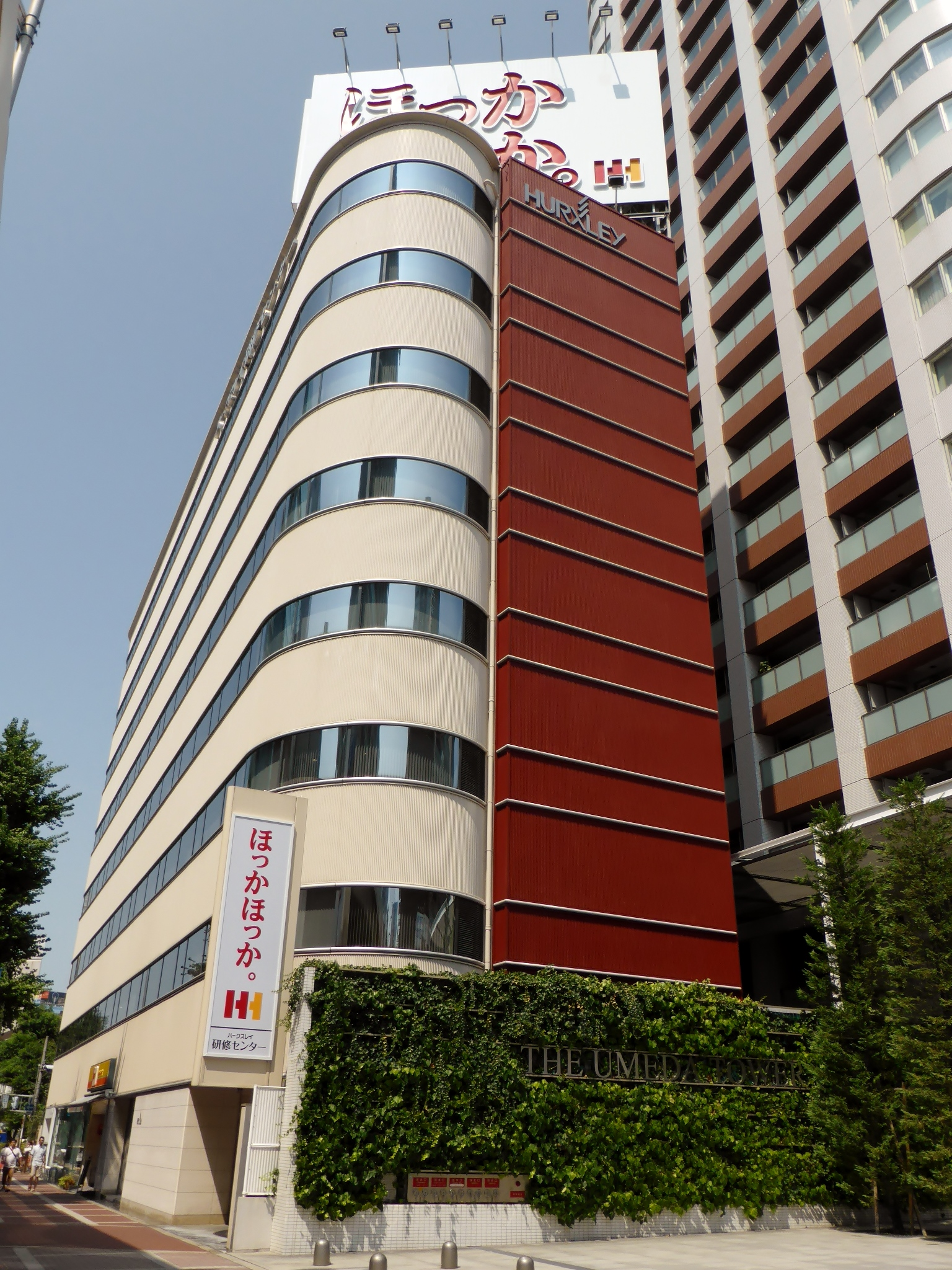 株式会社ハークスレイ本社を撮影。